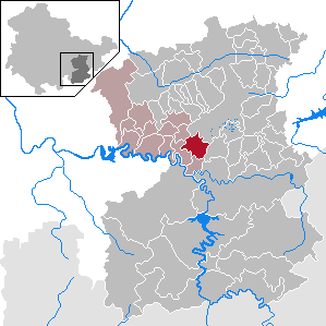 Schöndorf in Thuringia - Saale-Orla-Kreis